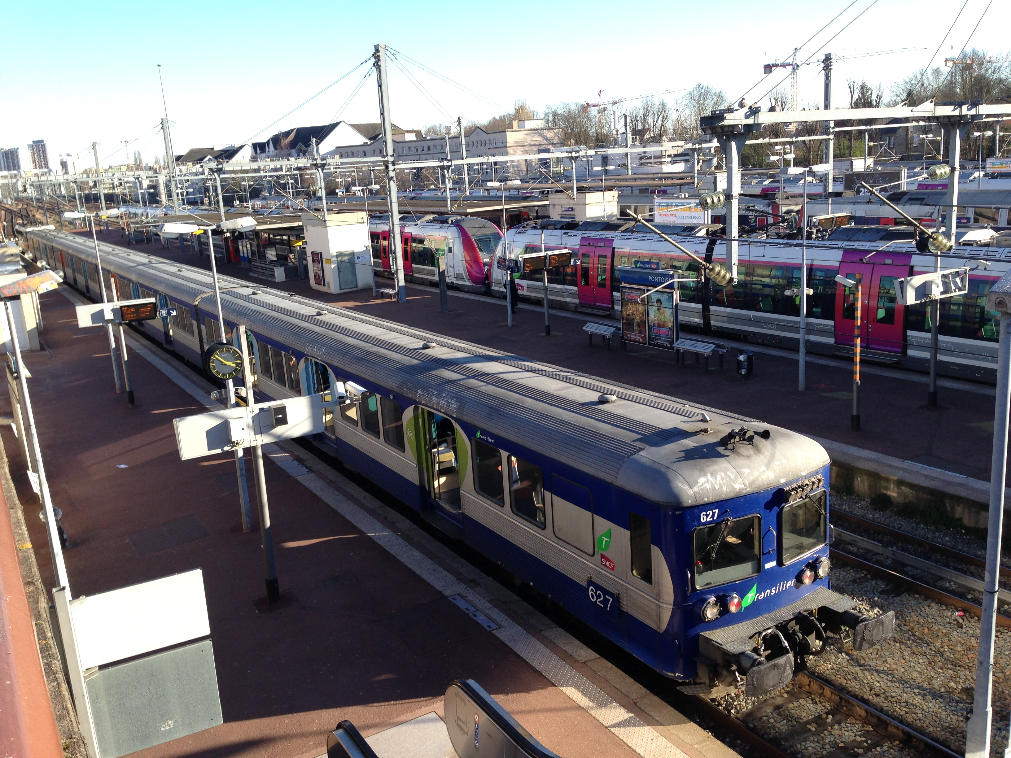 Le quai de la gare de Pontoise-2016